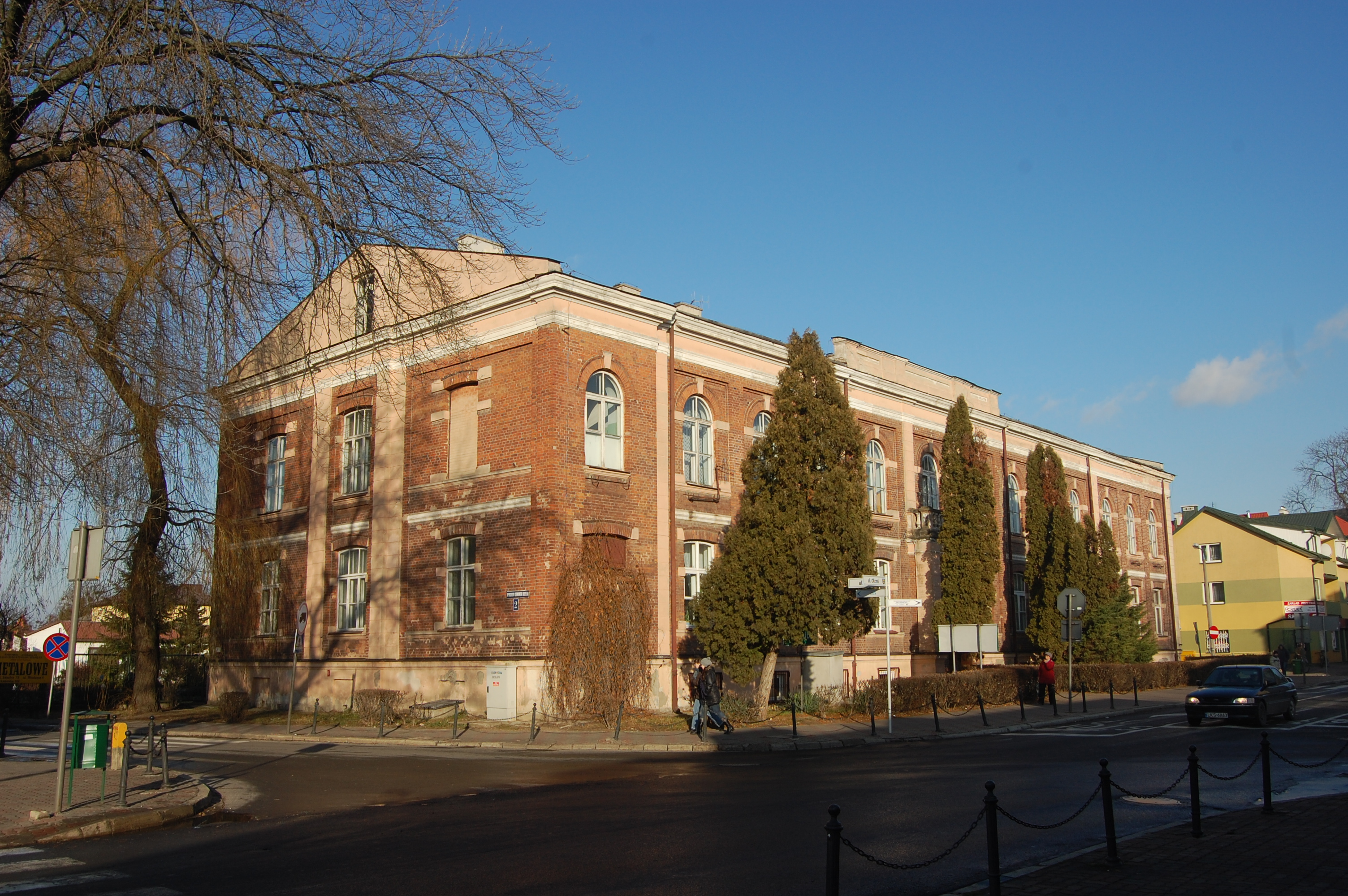 Krasnystaw, 2011-12-10